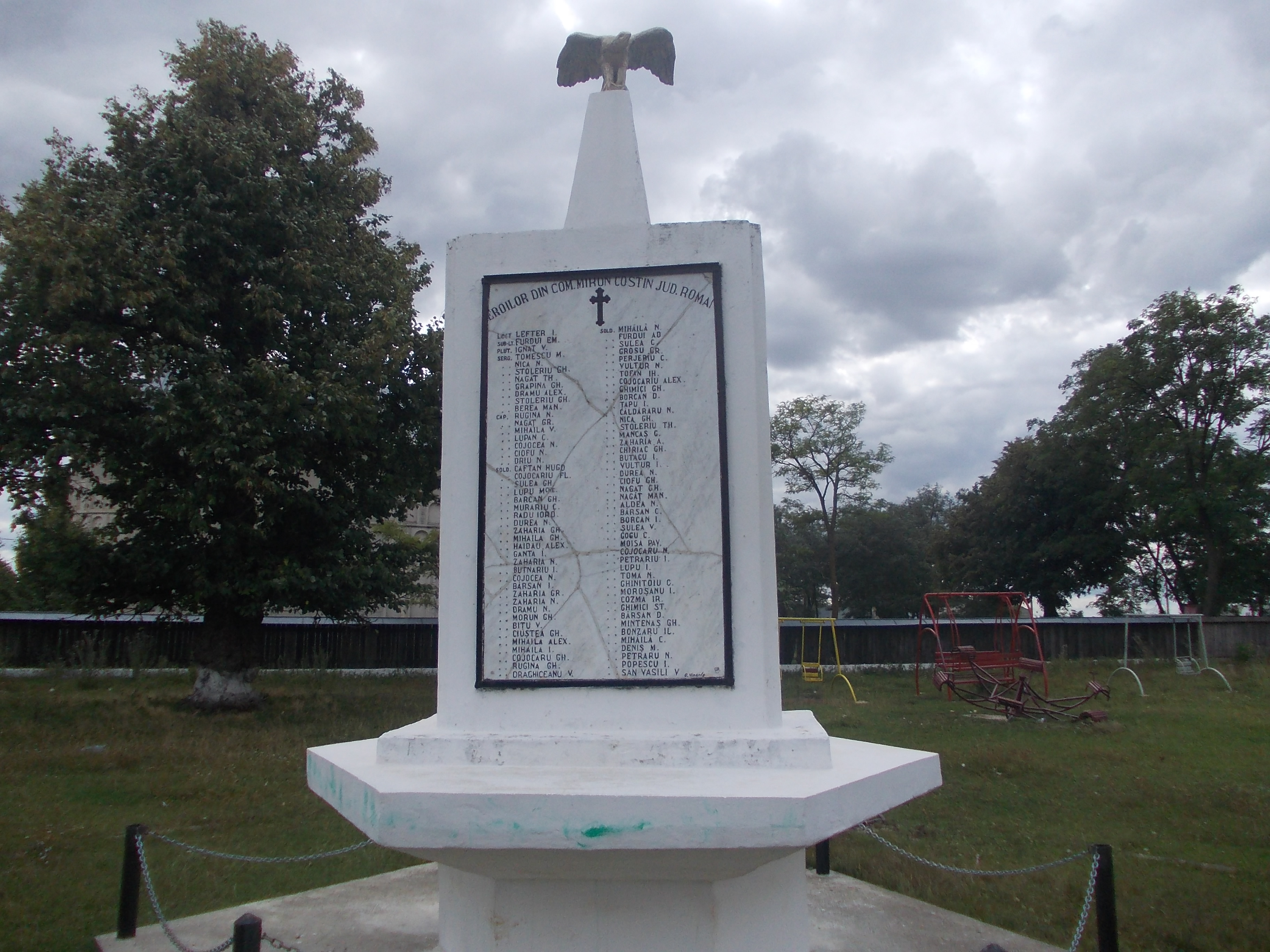 Monumentul Eroilor din comuna Miron Costin, judeţul Roman, azi sat Miron Costin, comuna Trifeşti, jud. Neamţ